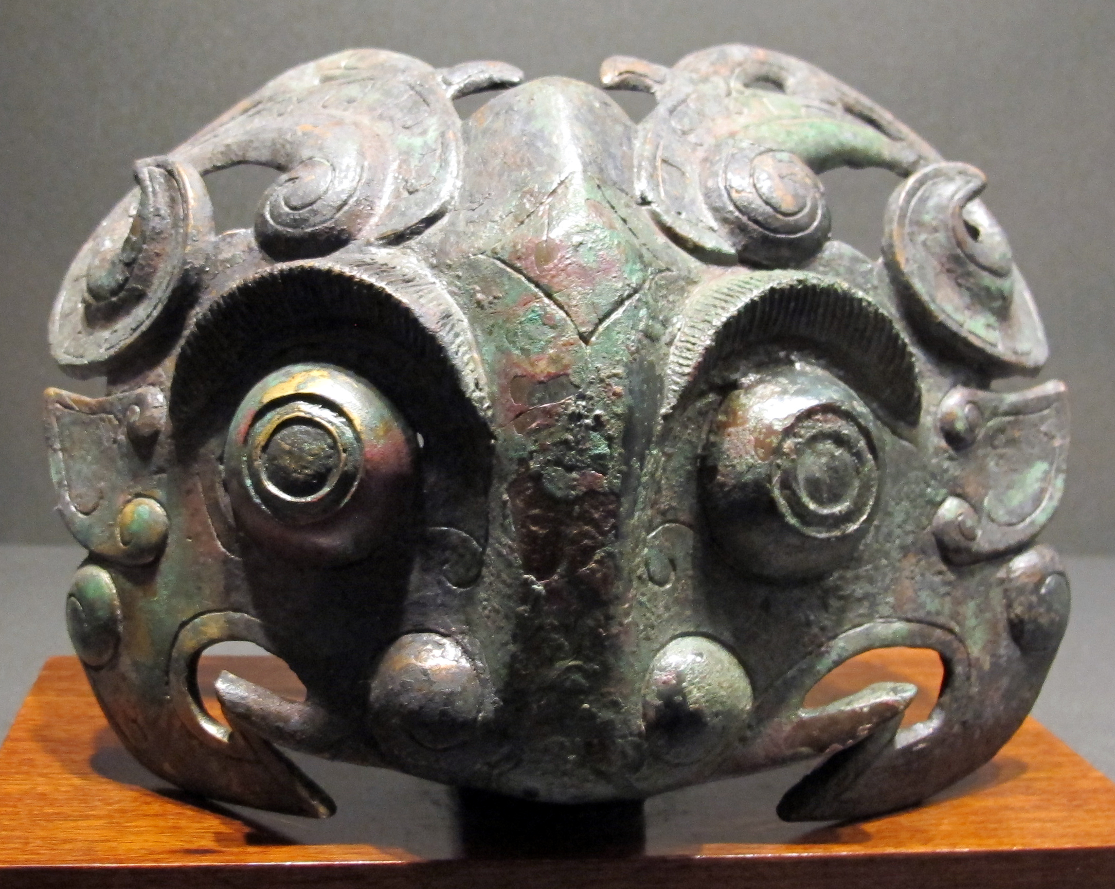 Dinastia shang, finemento decorativo a forma di maschera zoomorfa, XII-XI sec. ac.